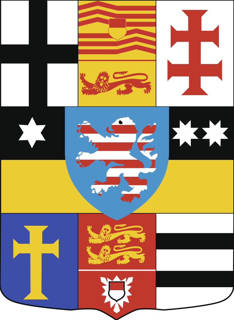 Wappen des Kurfürstentums Hessen 1818 / Coat of arms of the electorate of Hesse 1818